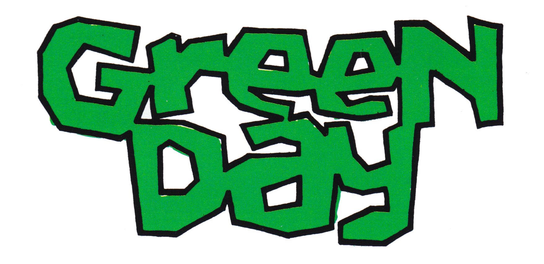 Green Day in kerplunk logo